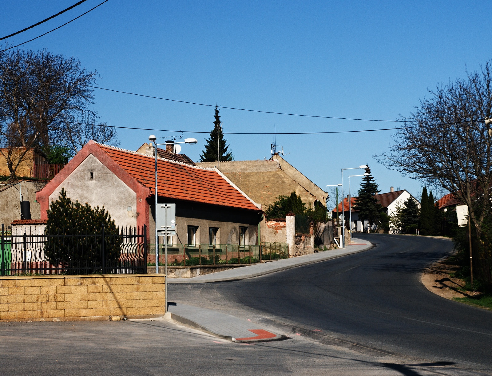 Vítov, celkový pohled na náves